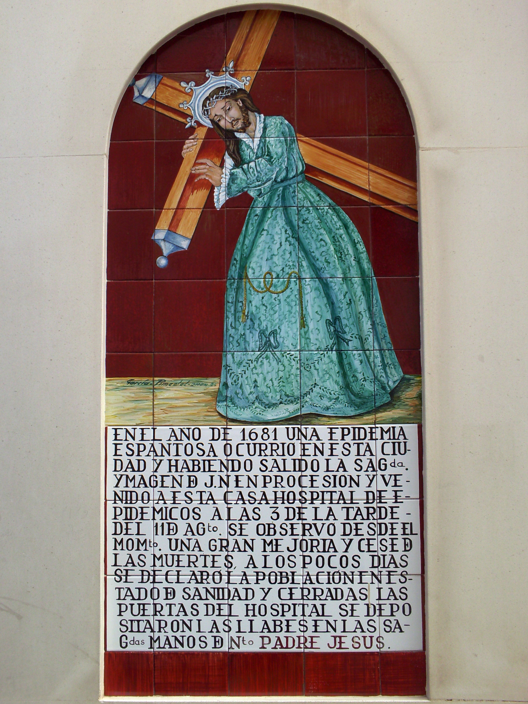 Mosaico de azulejos de Nuestro Padre Jesús, en Jaén.